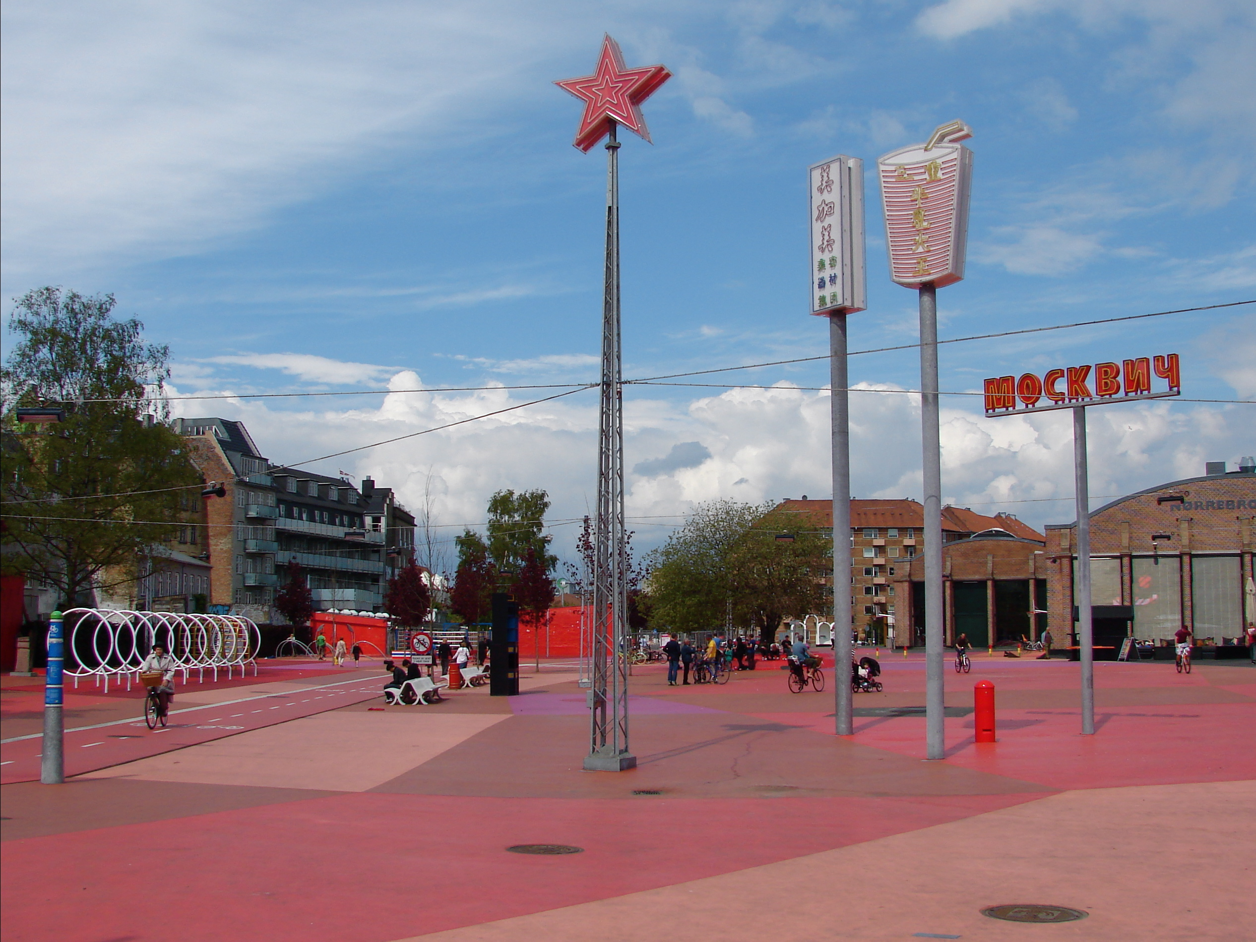 Superkilen park på Nørrebro, København